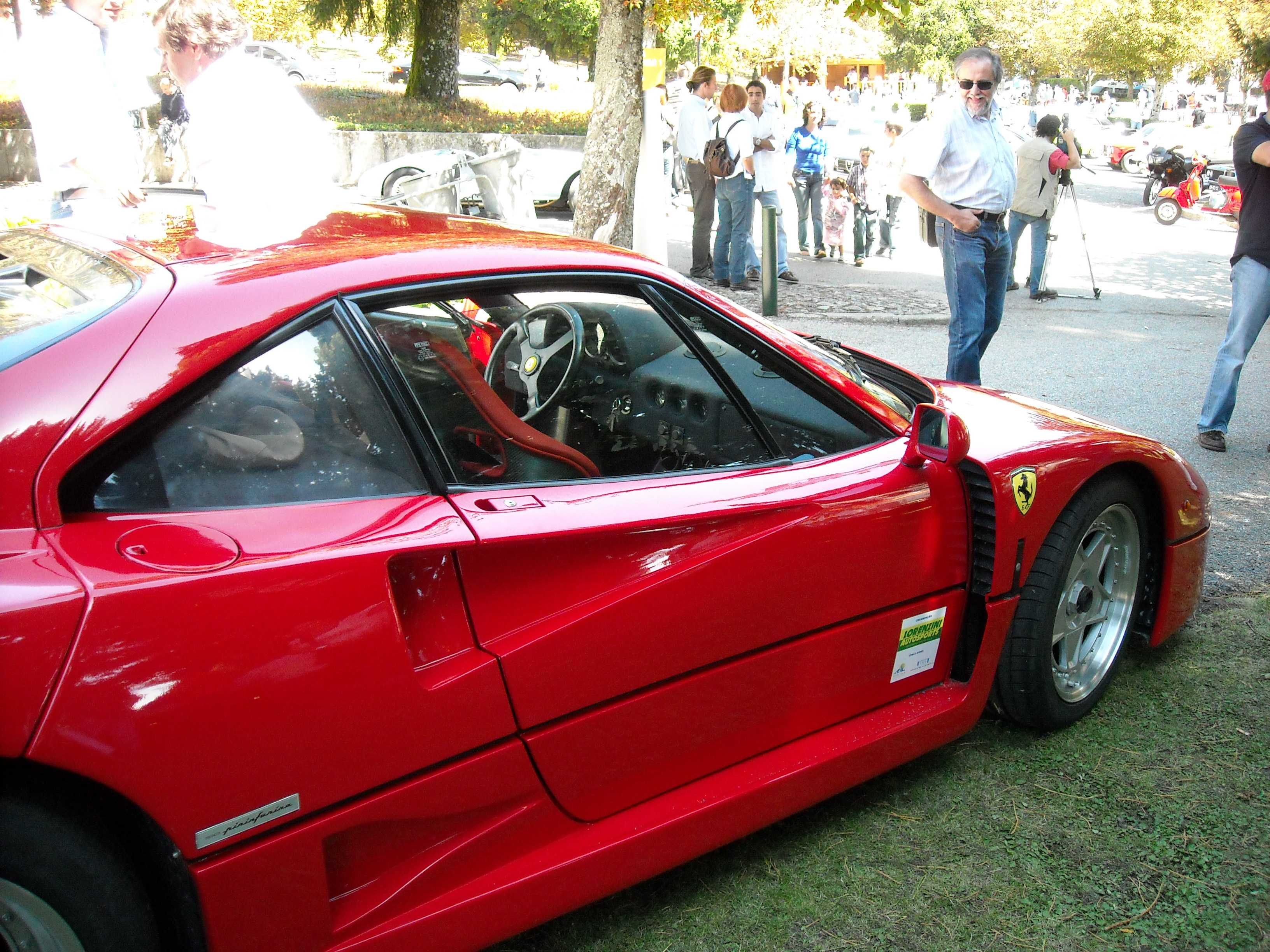 Motorshow, Caramulo, autos clásicos, septiembre 2008